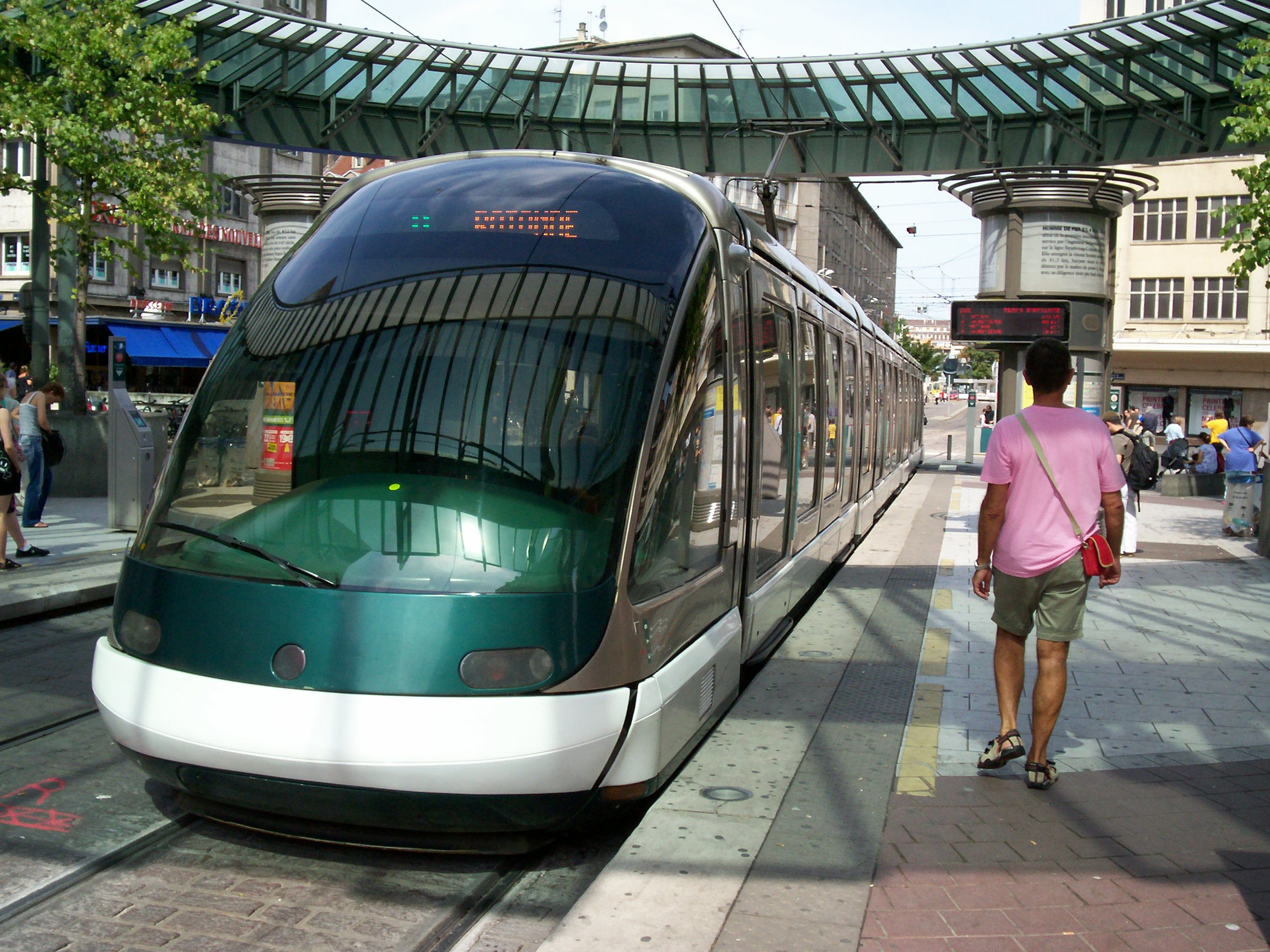 Tramway de Strasbourg Ligne D